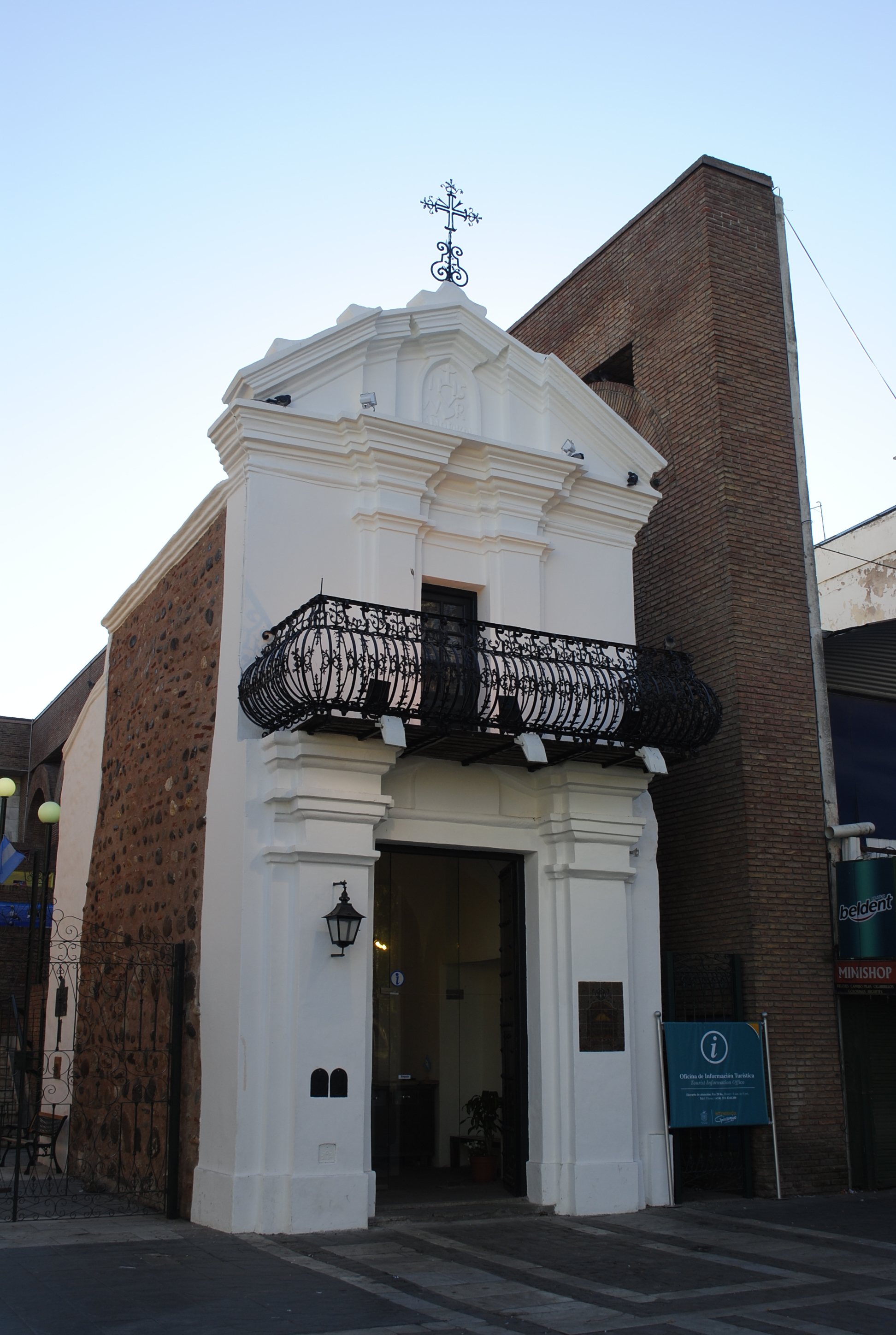 Se aprecia una pequeña fracción de la casa que ocupara el Obispo Fray Juan Manuel Mercadillo cuando se trasladó a Córdoba, la sede de la Diócesis de Tucumán en el año 1698. Cabe destacar la rica ornamentación del frente, en la que se destaca un balcón de hierro martillado, pieza única por su artesanía y dibujo, como así también el oratorio que formaba parte de la casona en que residía el Obispo. Detrás se levanta el moderno edificio de ladrillo a la vista que presenta una gran escalinata a manera de pirámide. Debajo de ésta funciona el Centro Municipal de Exposiciones.